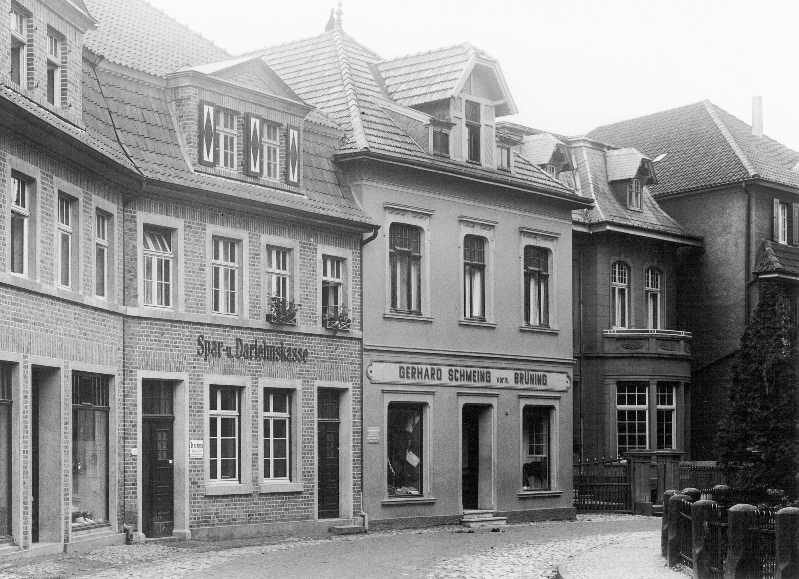 Bezug Hauptstelle 1927